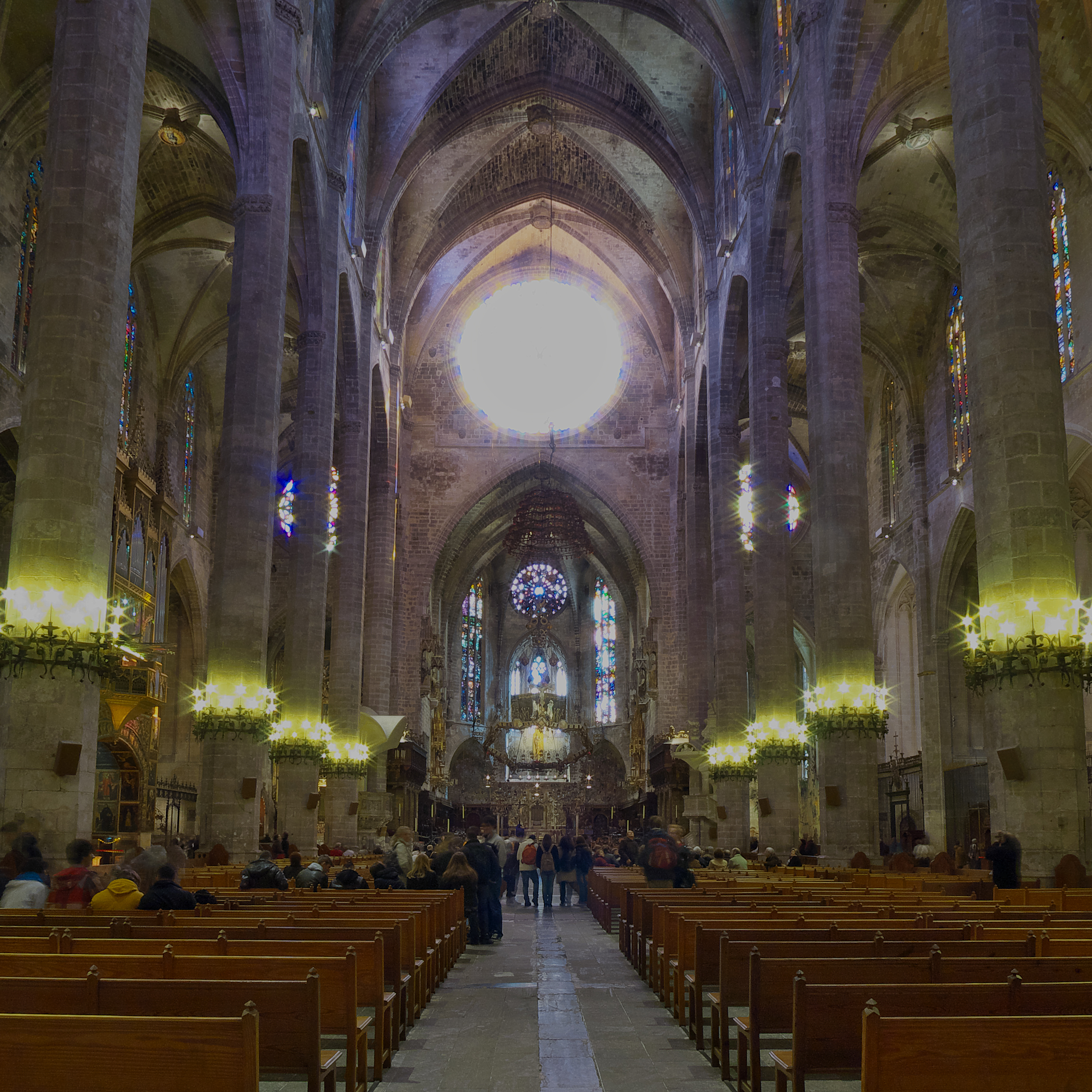 Vista de la cabecera de la catedral, su enorme rosetón y la esbeltez de sus pilares.